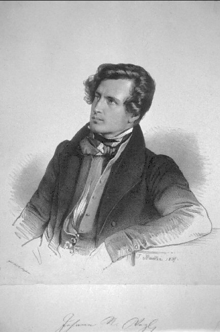 Johann Nepomuk Vogl, Lithographie von Josef Kriehuber